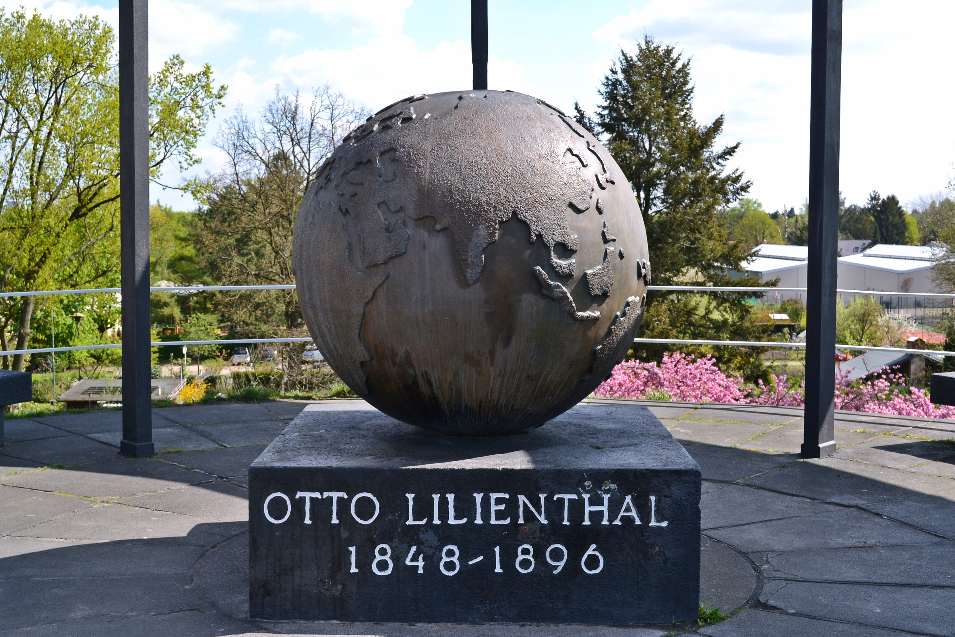 Lilienthal Denkmal auf dem Fliegeberg im Lilienthalpark, Berlin Lichterfelde